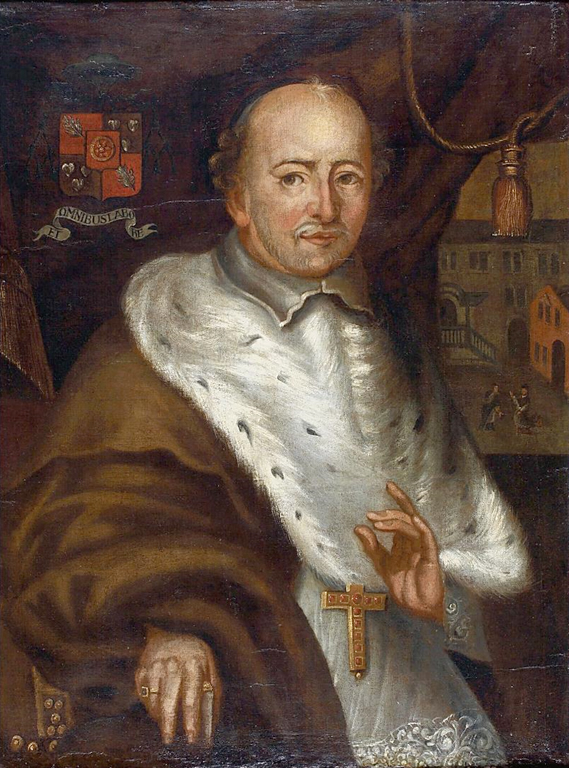 Retrato de Guillaume Herincx (1621-1678), bispo de Ypres